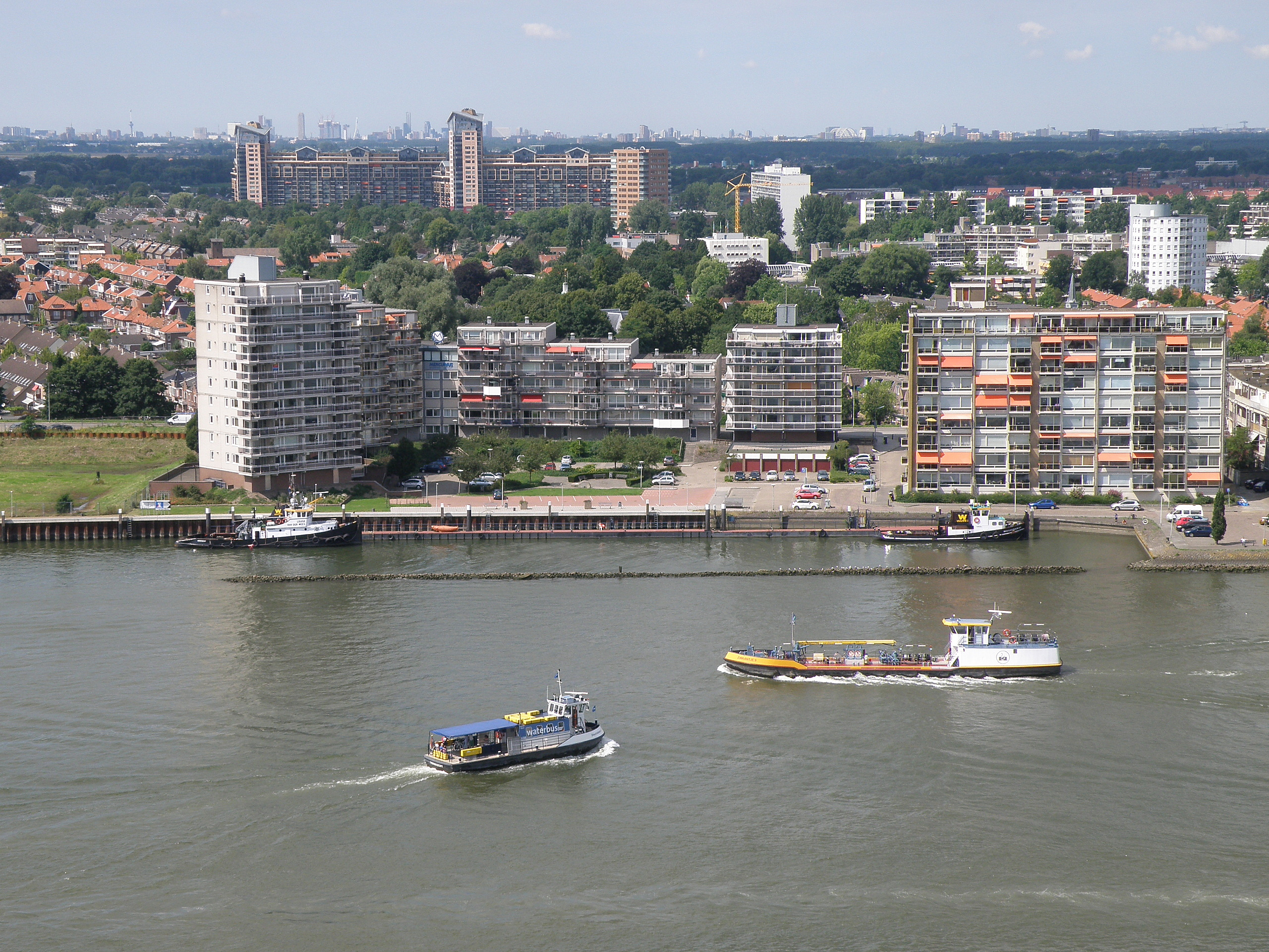 Zwijndrecht (Nederland). Foto genomen vanaf de top van de toren van de Grote Kerk te Dordrecht. Op voorgrond: de Maas. In de verte: stad Rotterdam. Blikrichting WNW.